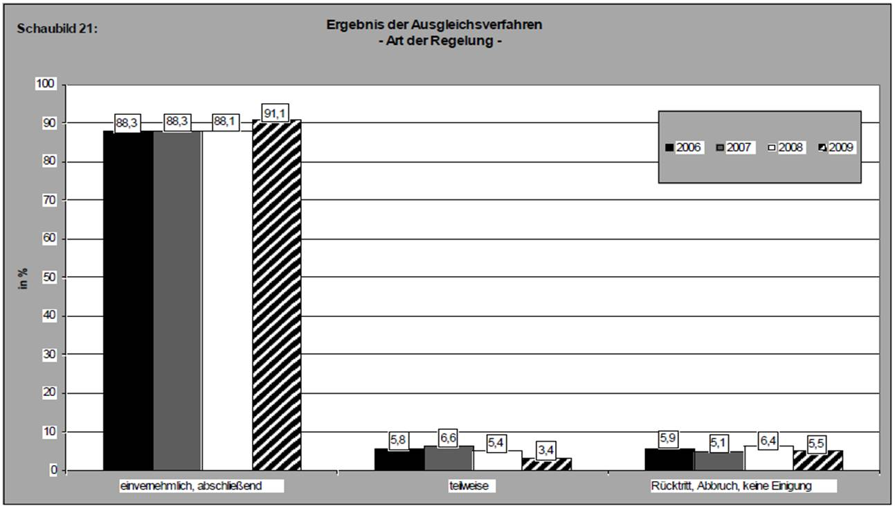 Die Statistik beschreibt für die Jahre 2006-2009 wie oft ein initiierter Täter-Opfer-Ausgleich erfolgreich war und es zu einer Abschlussvereinbarung gekommen ist